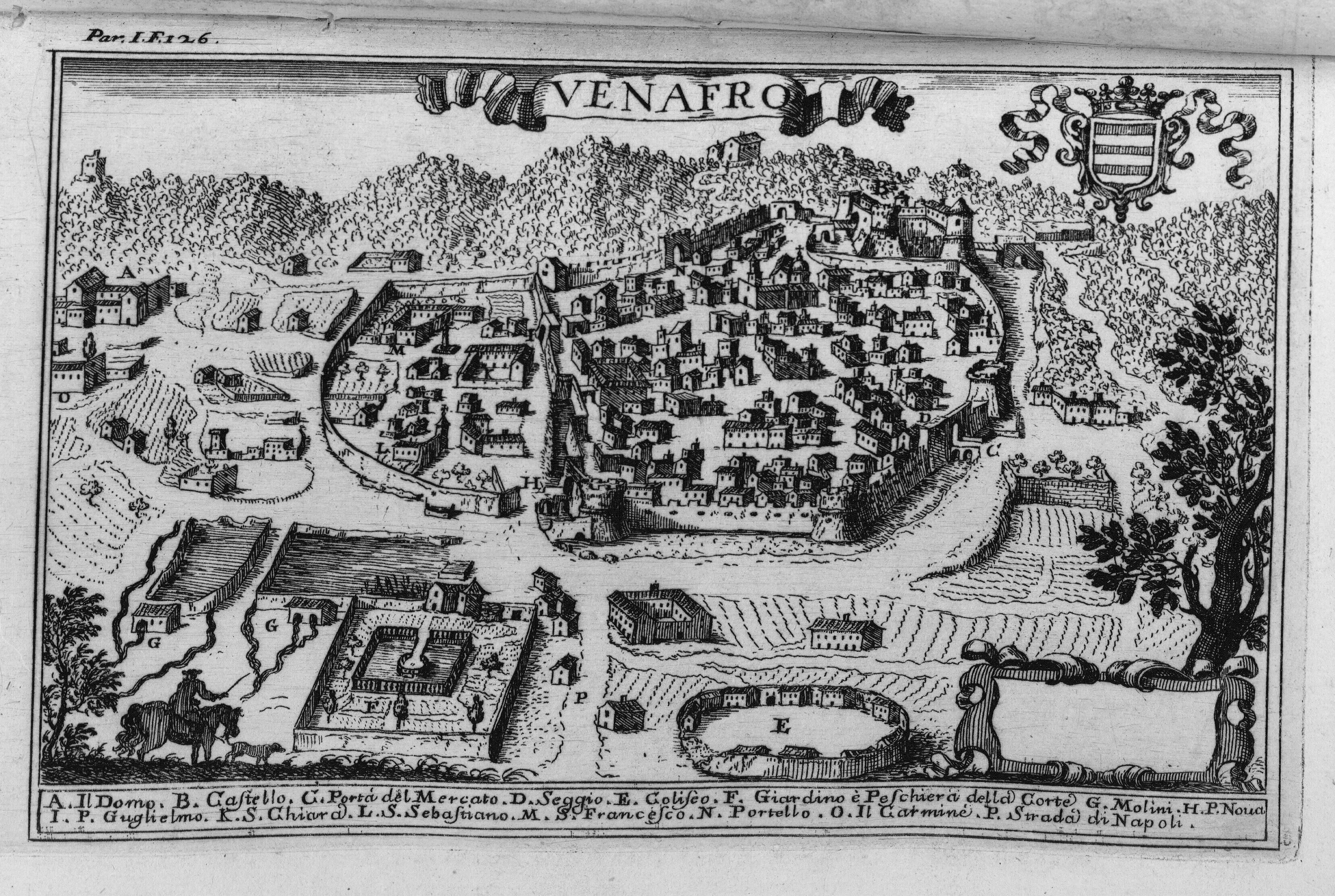 Autor: Pacichelli, Giovanni Battista, 1641-1702 Descripción bibliográfica: Il regno di Napoli in prospettiva : diviso in dodeci provincie, in cui si descrivono la sua Metropoli Fidelissima città di Napoli ... Opera postuma divisa in tre parti / dell'abatte Gio. Battista Pacichelli ; Parte prima [-terza] ... Del regno di Napoli in prospettiva / dell'abate Pacichelli. Parte prima. - In Napoli : nella Stamperia di Michele Luigi Mutio, 1703. - v. : principalmente il.; 4º . - Inic. adorn. y frisos dec. - Grab. calc. y h. pleg. grab. calc. de mapas de Cassianus de Silva. Ilustrador: Cassiano De Silva, Francesco, il. Impresor: Muzio, Michele Luigi, imp. Lugar de impresión: Italia. Nápoles Localización: Vea la ilustración en su contexto